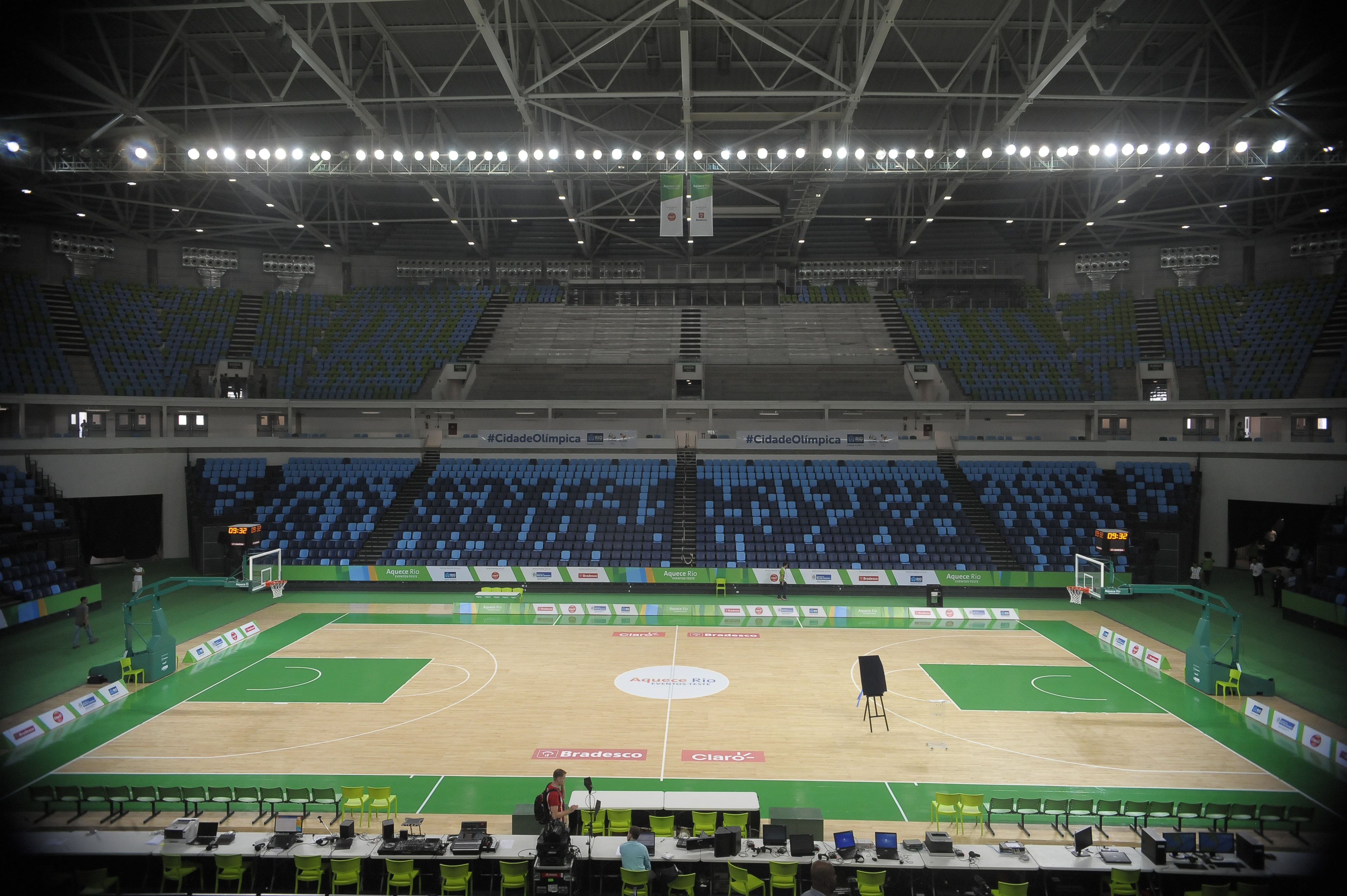 Inaugurazione dell'Arena Carioca 1